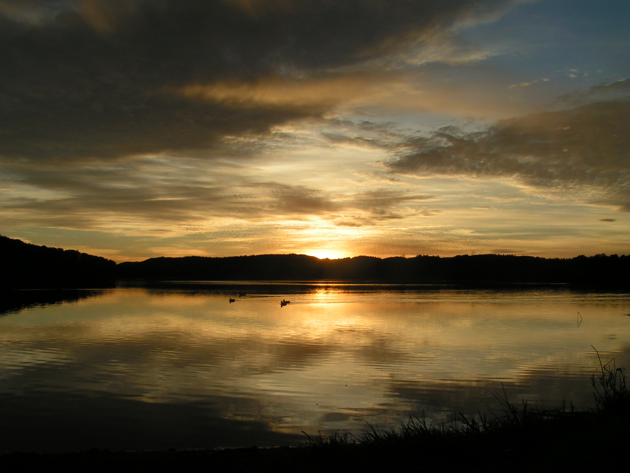 Billede af "sortsol" ved Ørnsø i Silkeborg